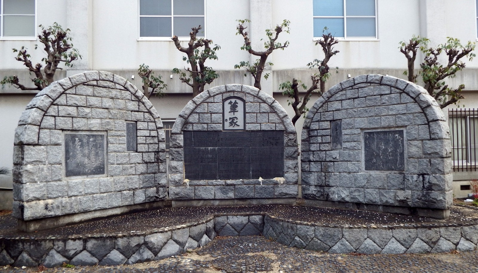 南光坊の筆塚